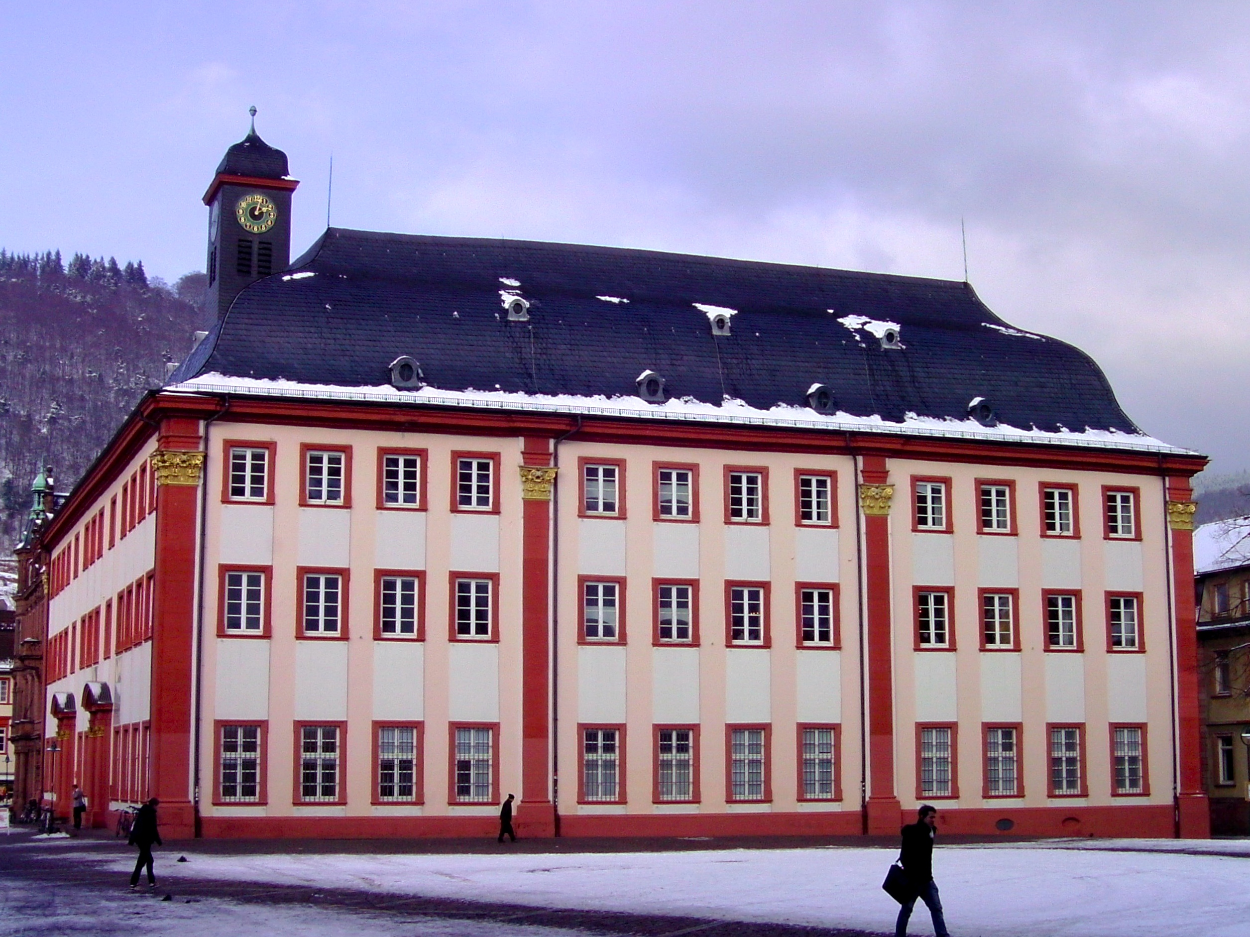 Alte Universität (Heidelberg), Universitätsplatz (Heidelberg) im Winter